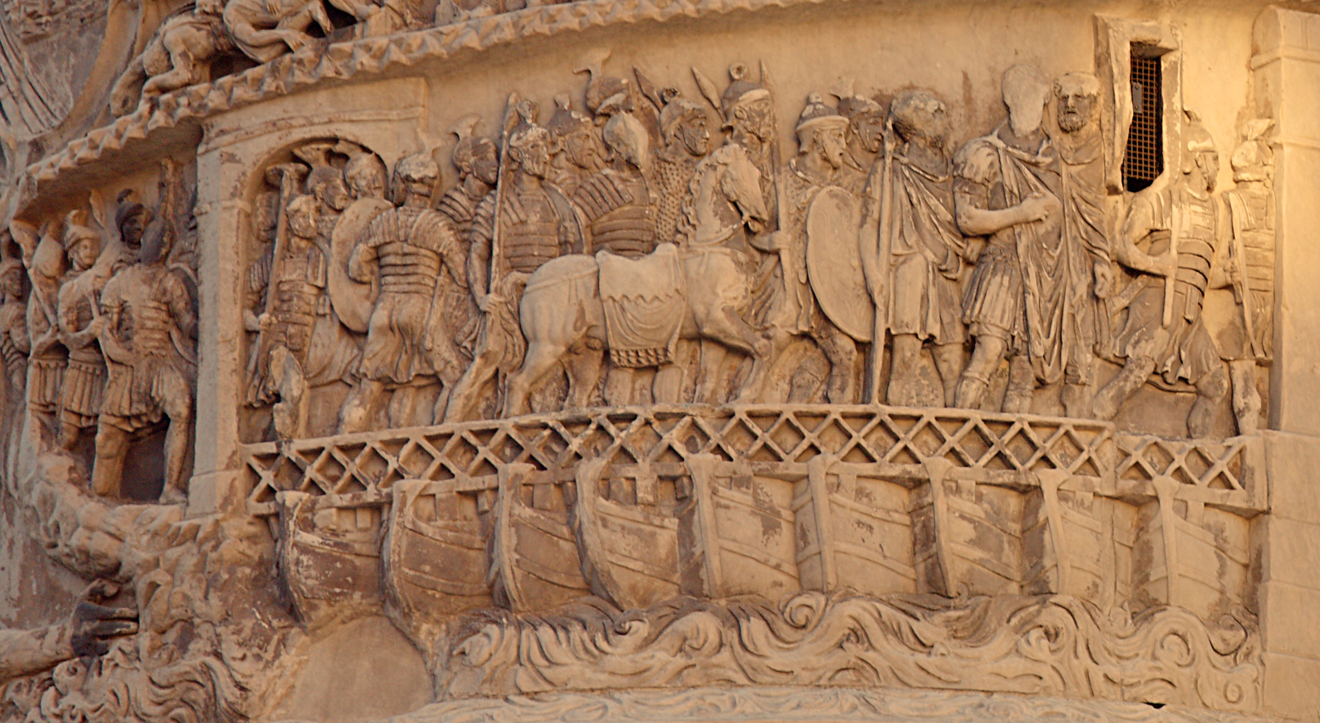 Detalle de la Columna de Marco Aurelio en Roma (Italia), en la que aparecen las tropas romanas encabezadas por el emperador Marco Aurelio atravesando el Danubio mediante un puente de barcas.